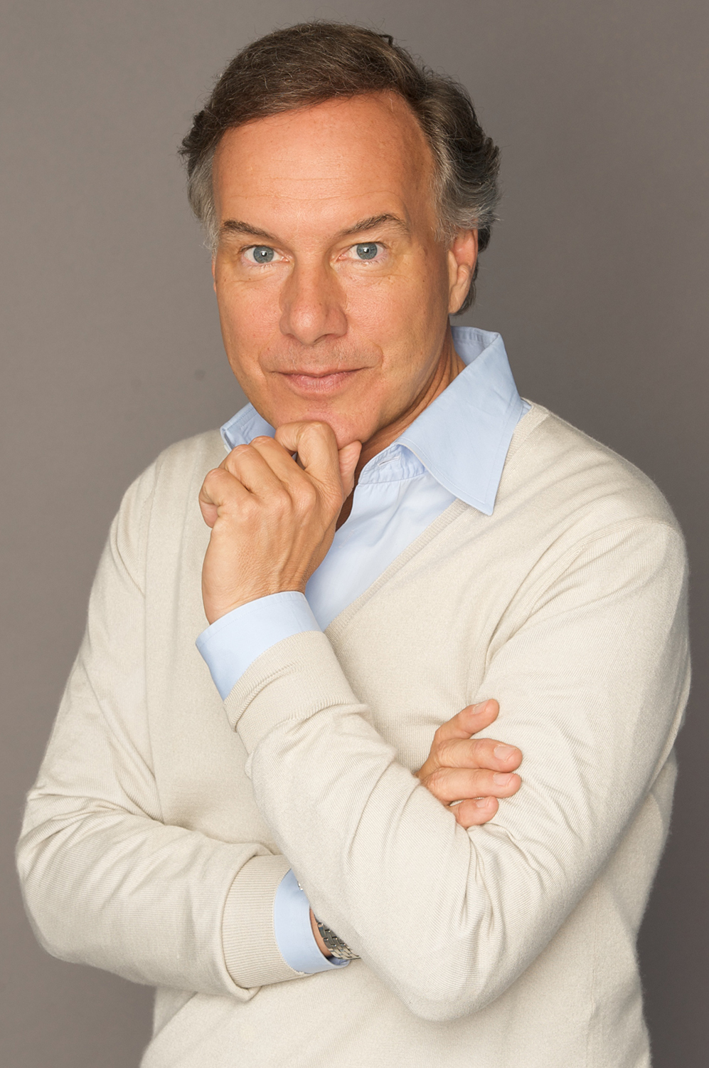 Nico Hofmann